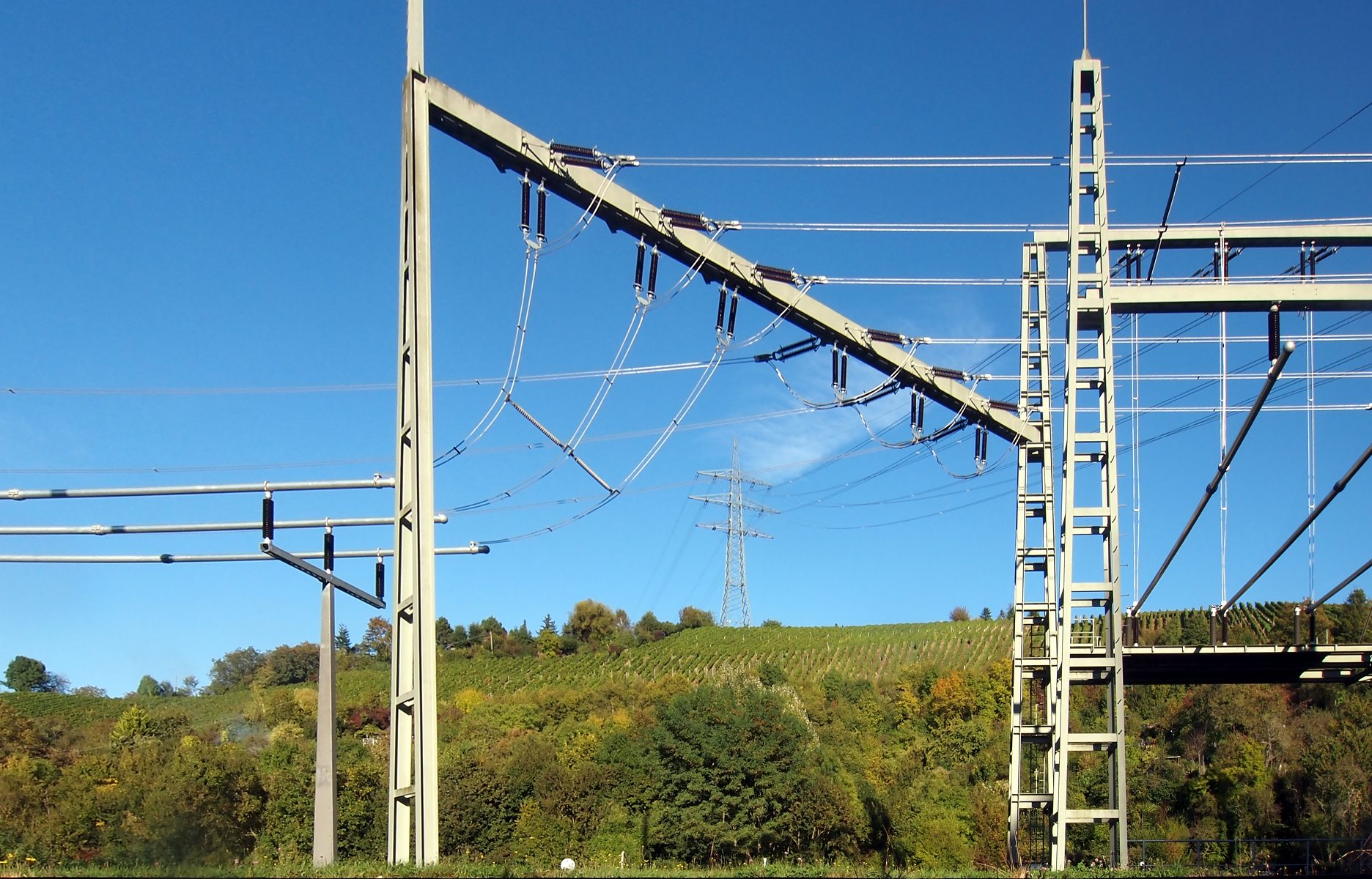 Man könnte sich auch vorstellen, dass die neue 110kV-Leitung vom Berg gleich auf das schräg stehende Portal geführt wird. Stattdessen führt sie zum alten 220kV-Portal und wird mit einer sehr umständlichen Anoprdnung aus Stromschienen und Kabelstücken hingeführt.